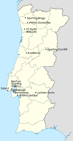 Carta dos clubes participantes do campeonato de portugal de futebol de primeira divisao 1952-1953